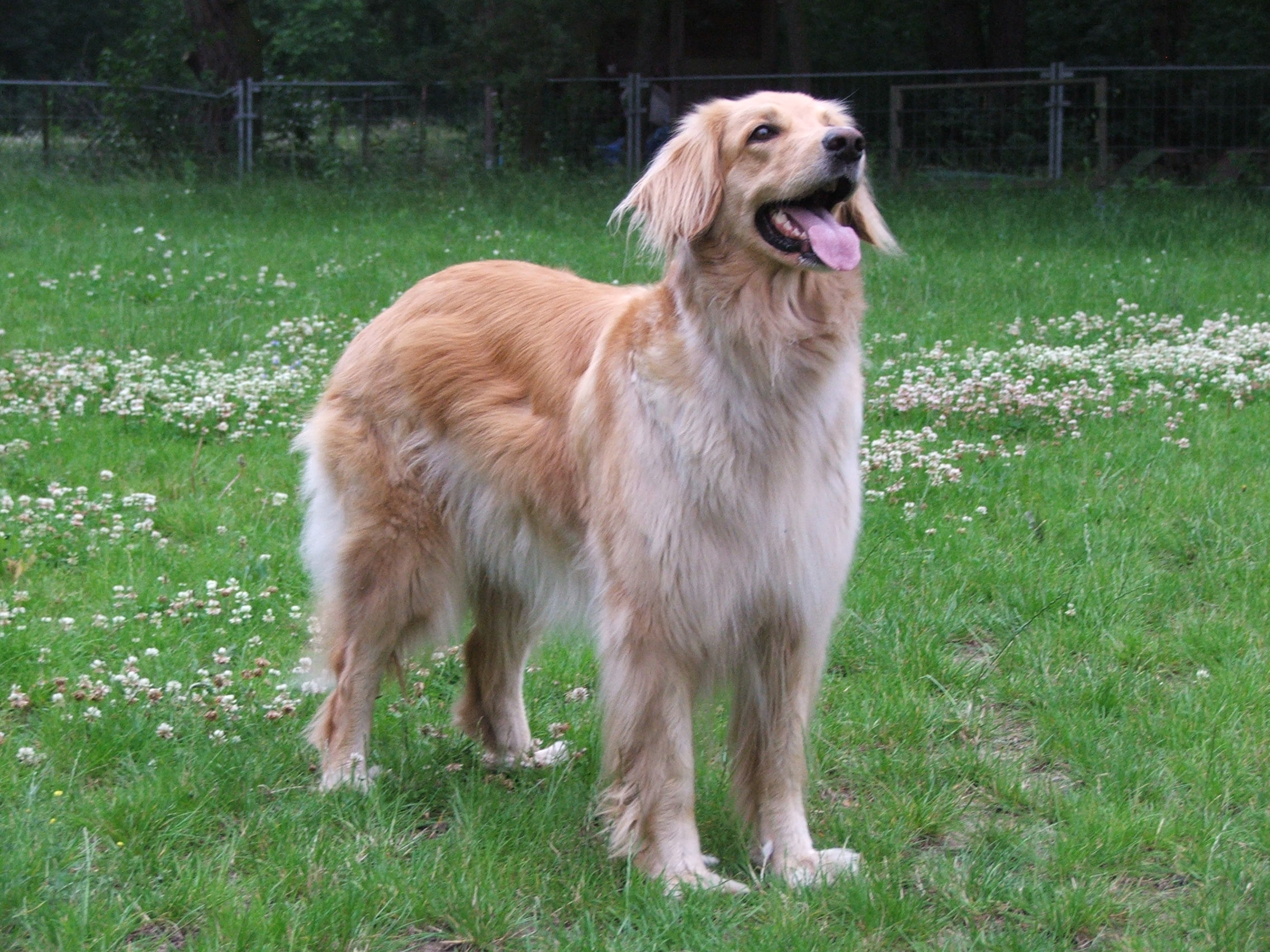 CACIB Siegerin Berlin / Delina von den Torwitzer Tannen / (HZD/FCI)